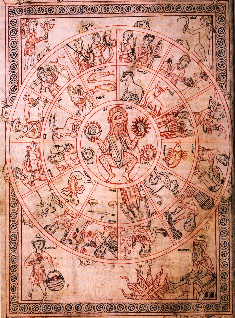 Kosmologische Darstellung des Jahreszyklus, Kloster Zwiefalten, Württembergische Landesbibliothek Stuttgart, Cod. hist. 2° 415, fol. 17v.